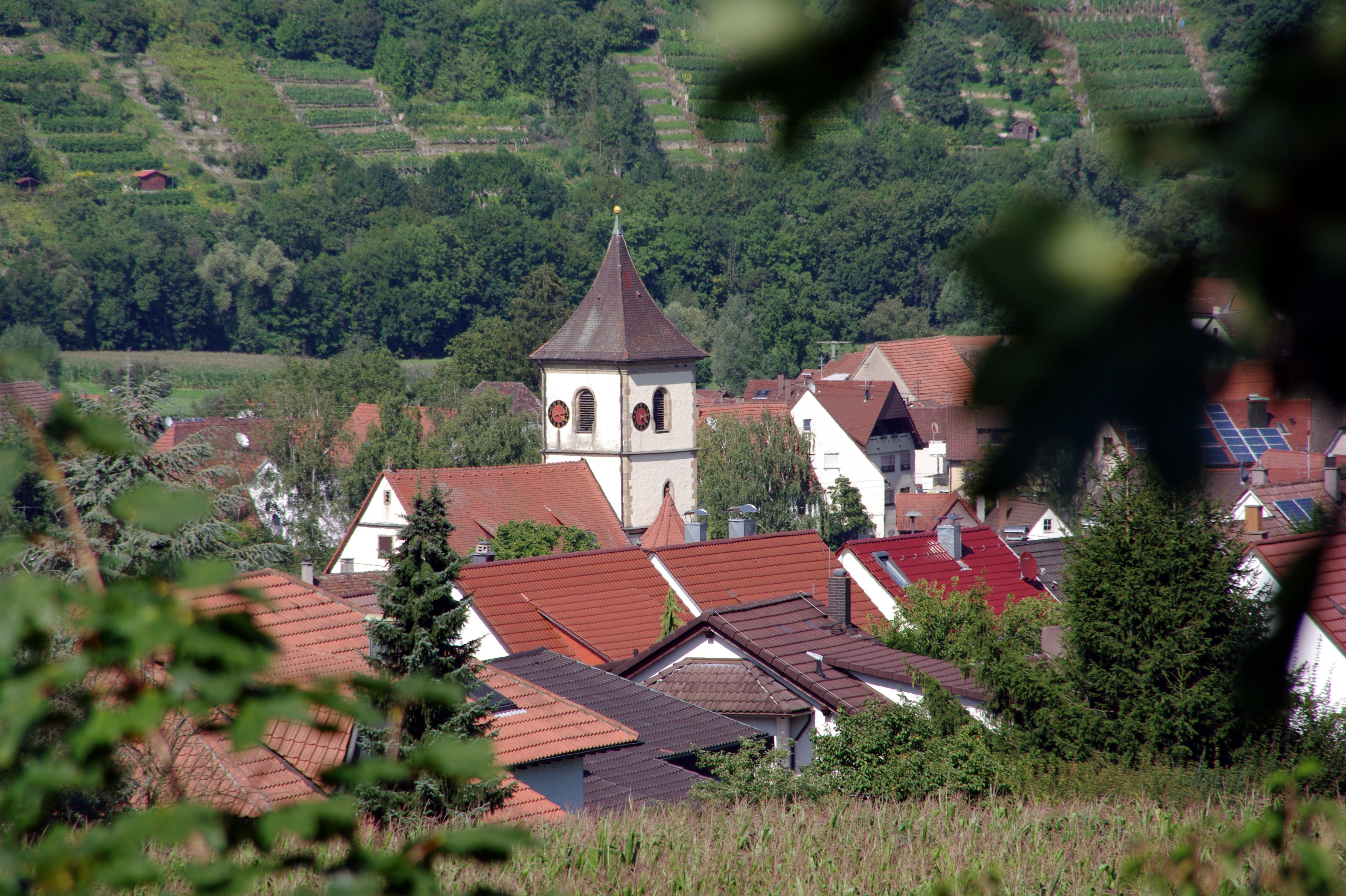 Blick vom Friedhof auf den Ortskern von Unterriexingen mit der evangelischen Pfarrkirche. Im Hintergrund die Unterriexinger Weinberge über der Enz.